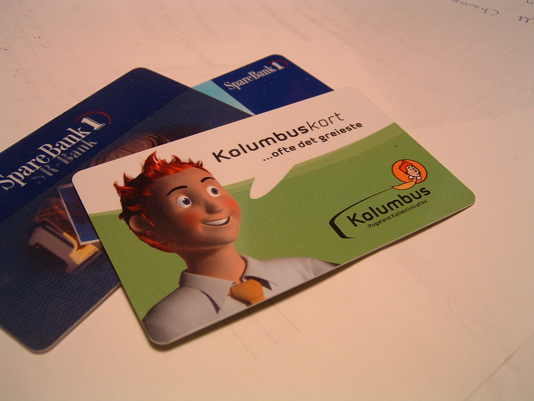 Kolumbuskortet, et reisekort brukt i Rogaland utgitt av Kolumbus.